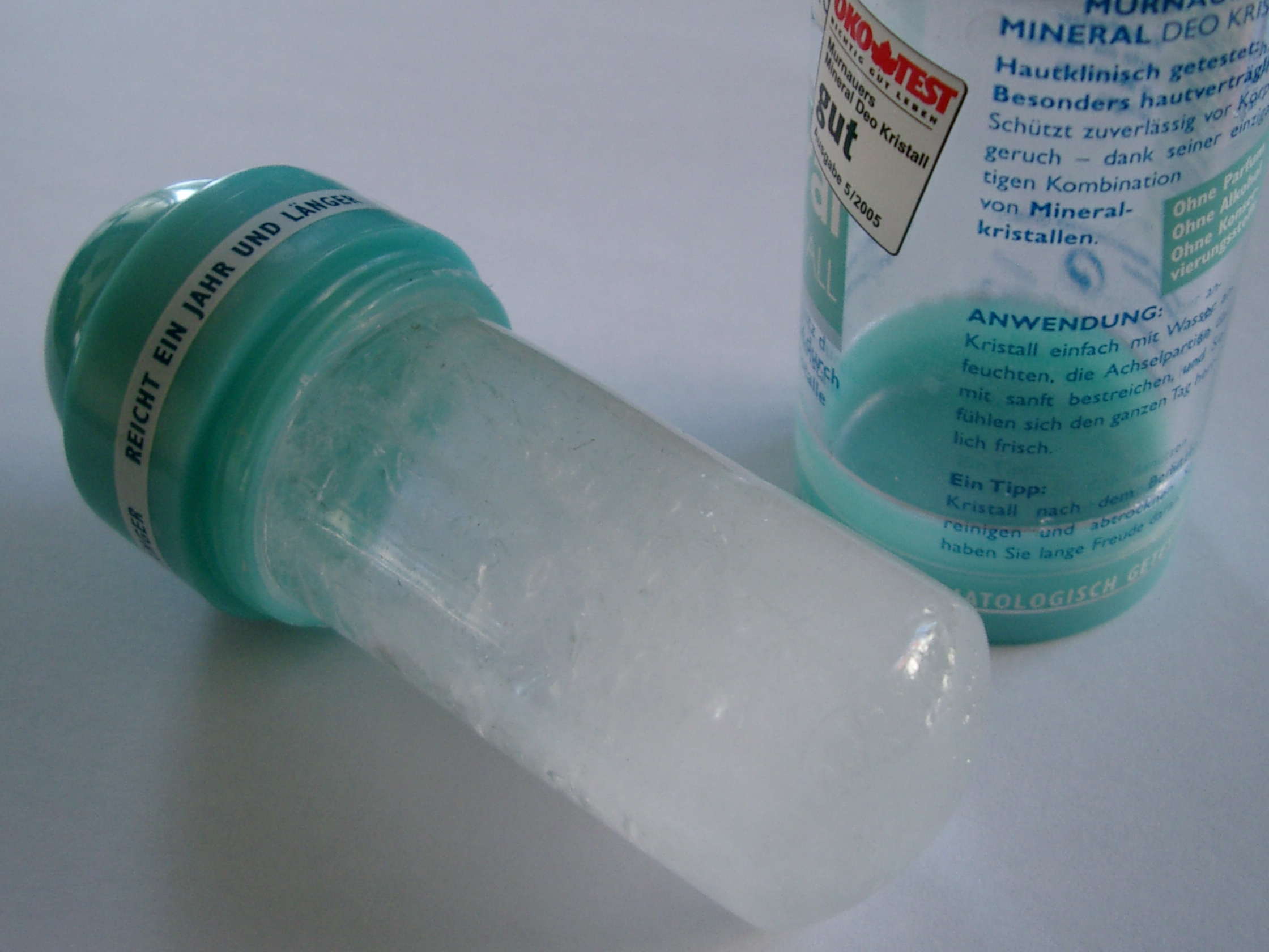 Deo Kristall des Herstellers "Murnauers"